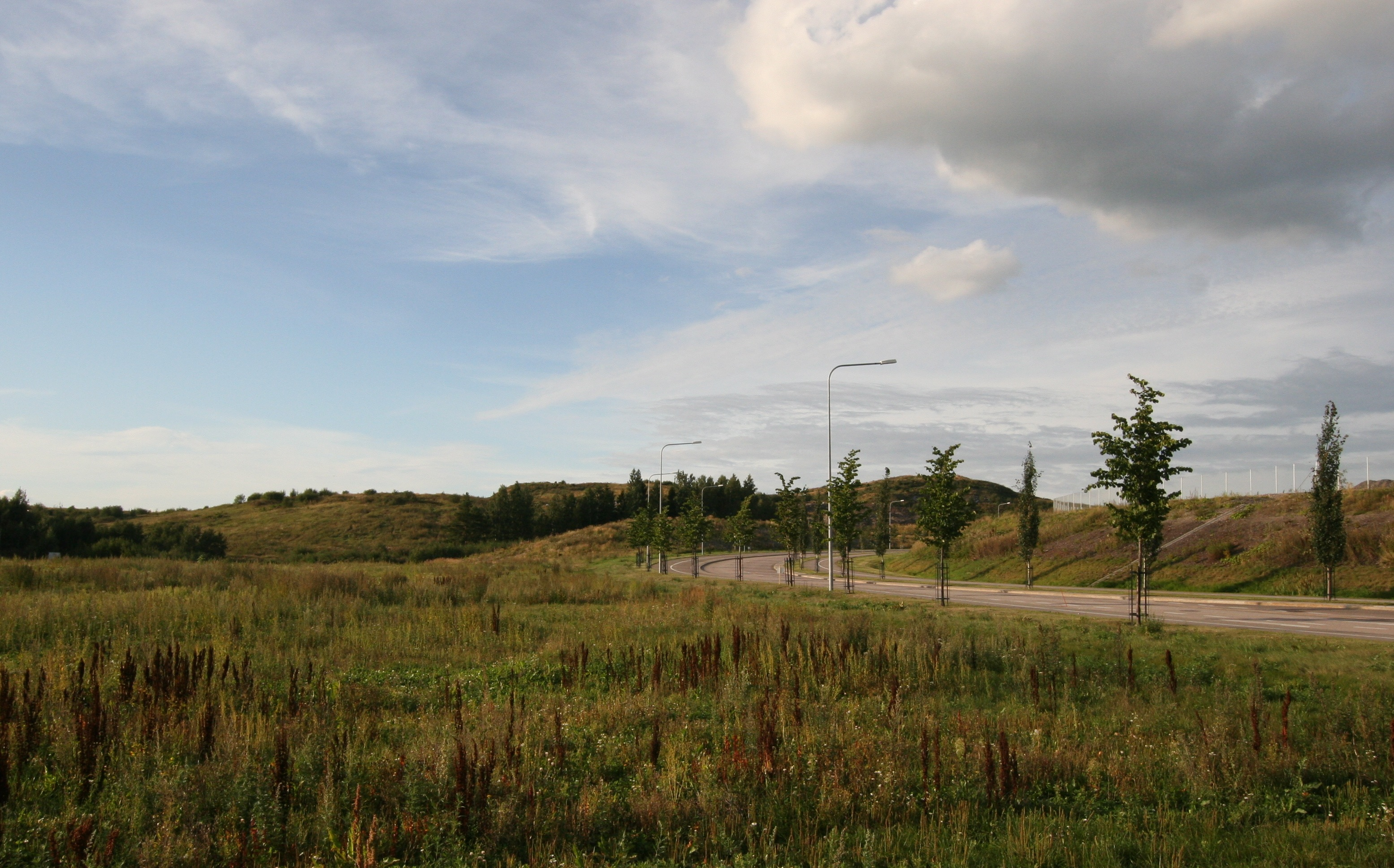 Vuosaaren huippu Niinisaarentieltä nähtynä